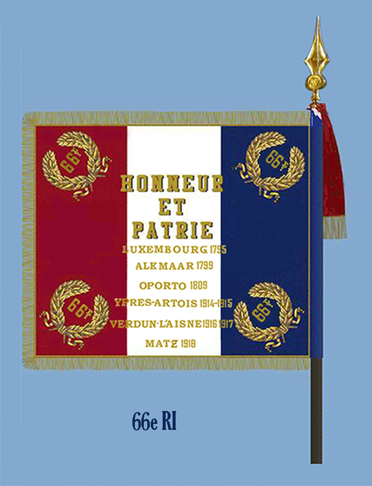 Fahne des 66. Infanterie Regiment 1980 (Rückseite)